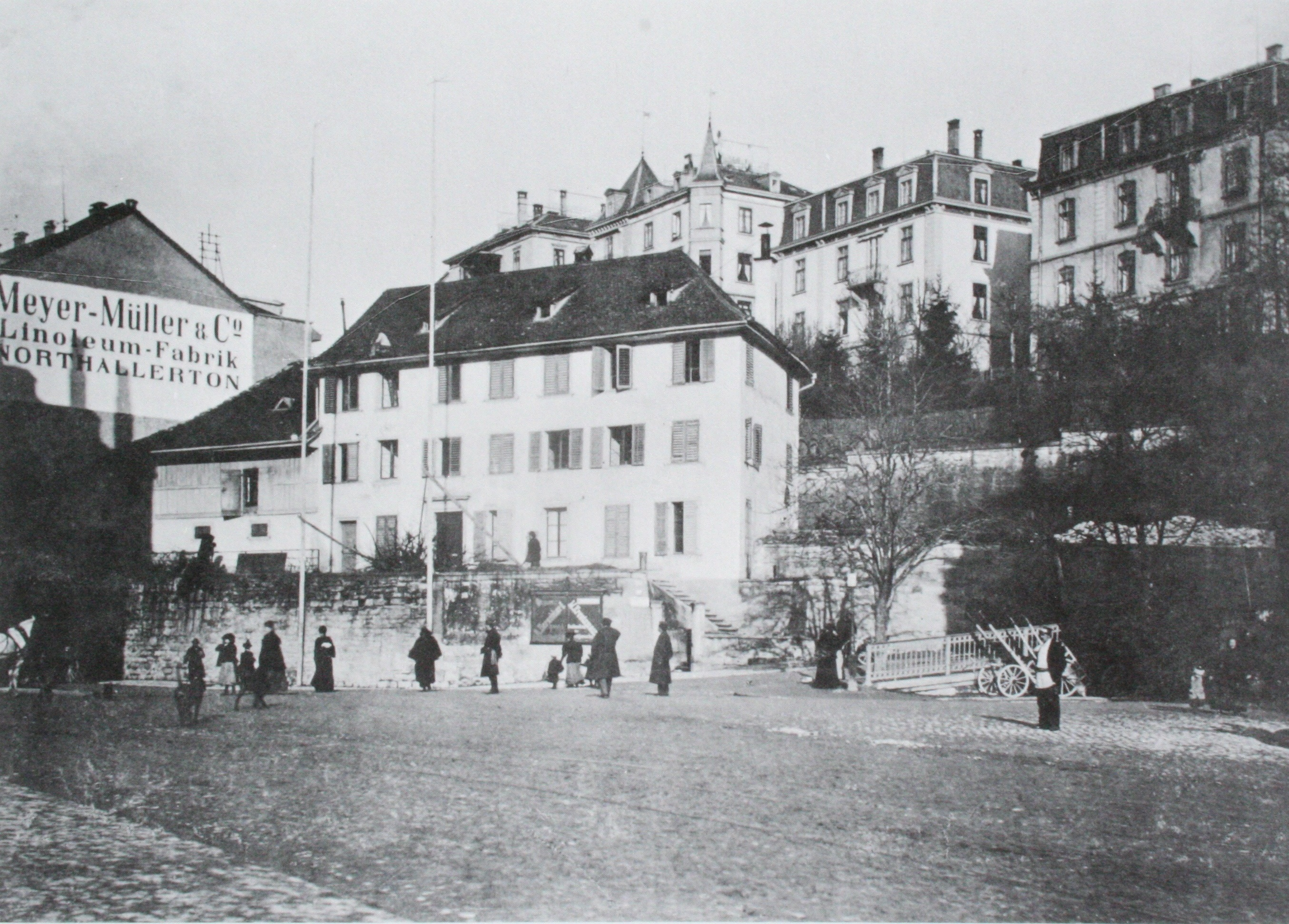 1895, Blick nach Nordosten. An der Stelle des Rordorfschen Hauses in der Bildmitte beginnt heute die Weinbergstrasse